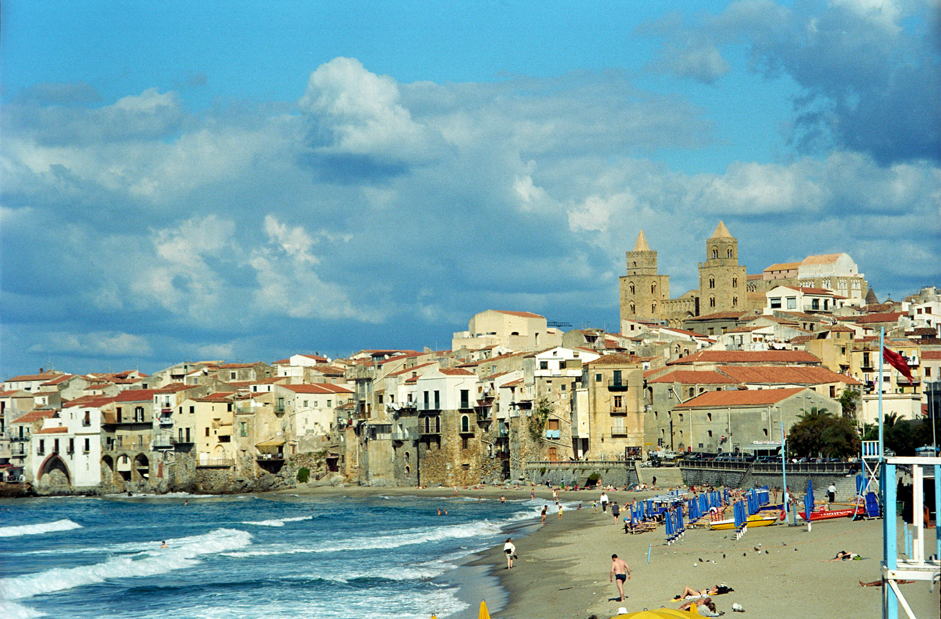 Cefalù - panorama, Sicily